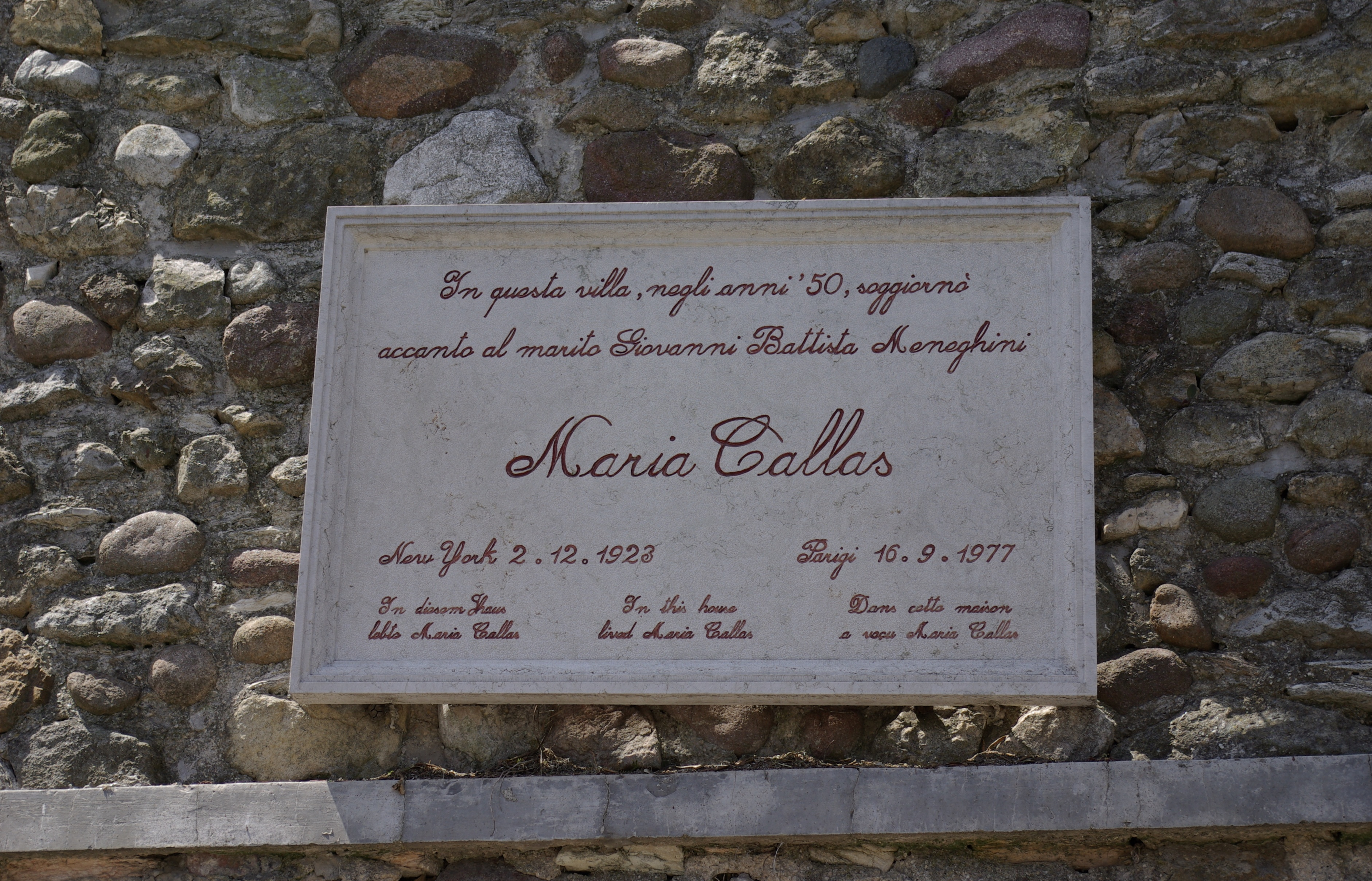 Gedenktafel in der Via C.V. Catullo in Sirmione an der Villa, in der Maria Callas zwischen 1950 und 1959 mit Giovan Battista Meneghini lebte.